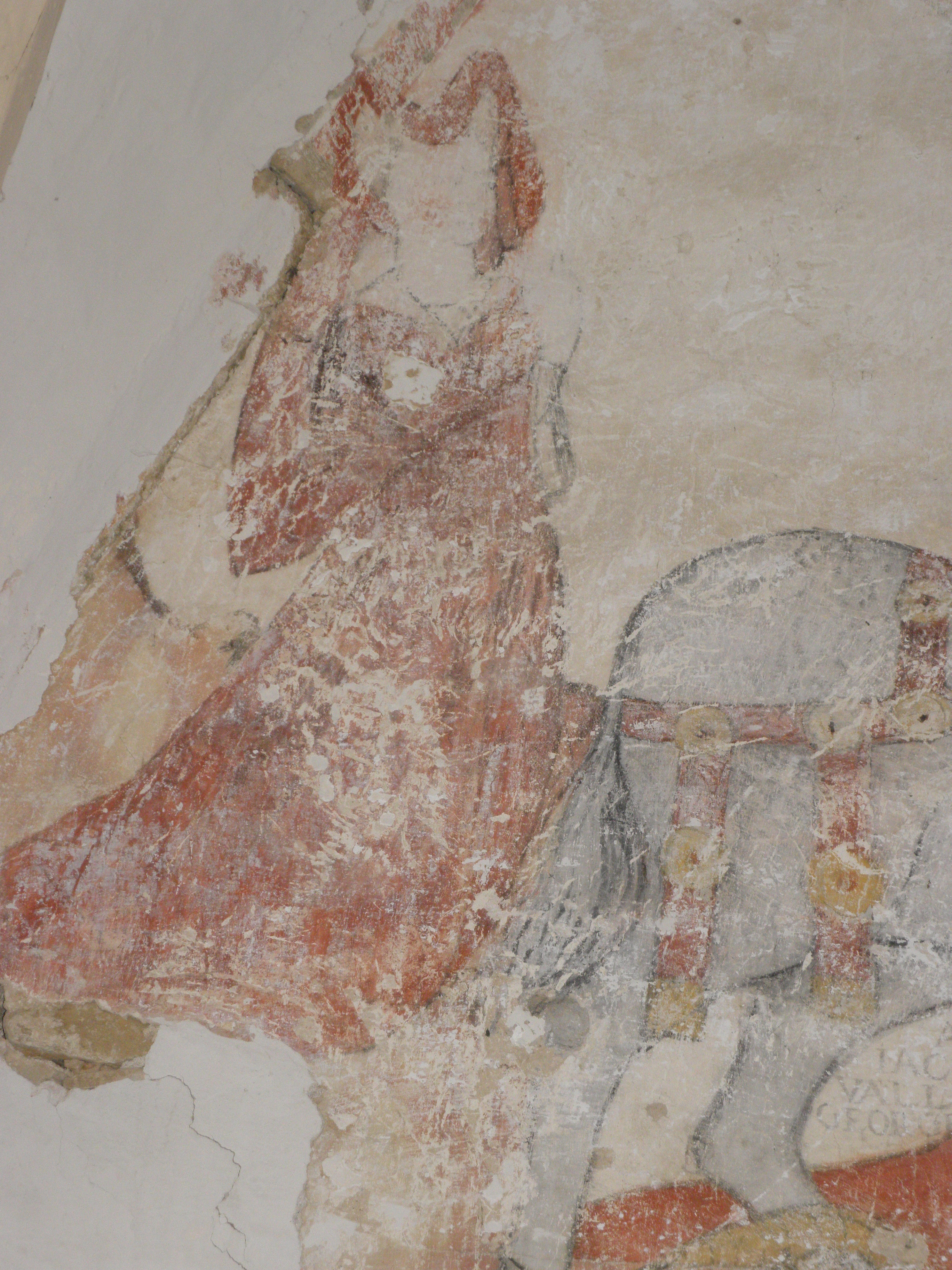 une femme (la donatrice de la fresque ?)